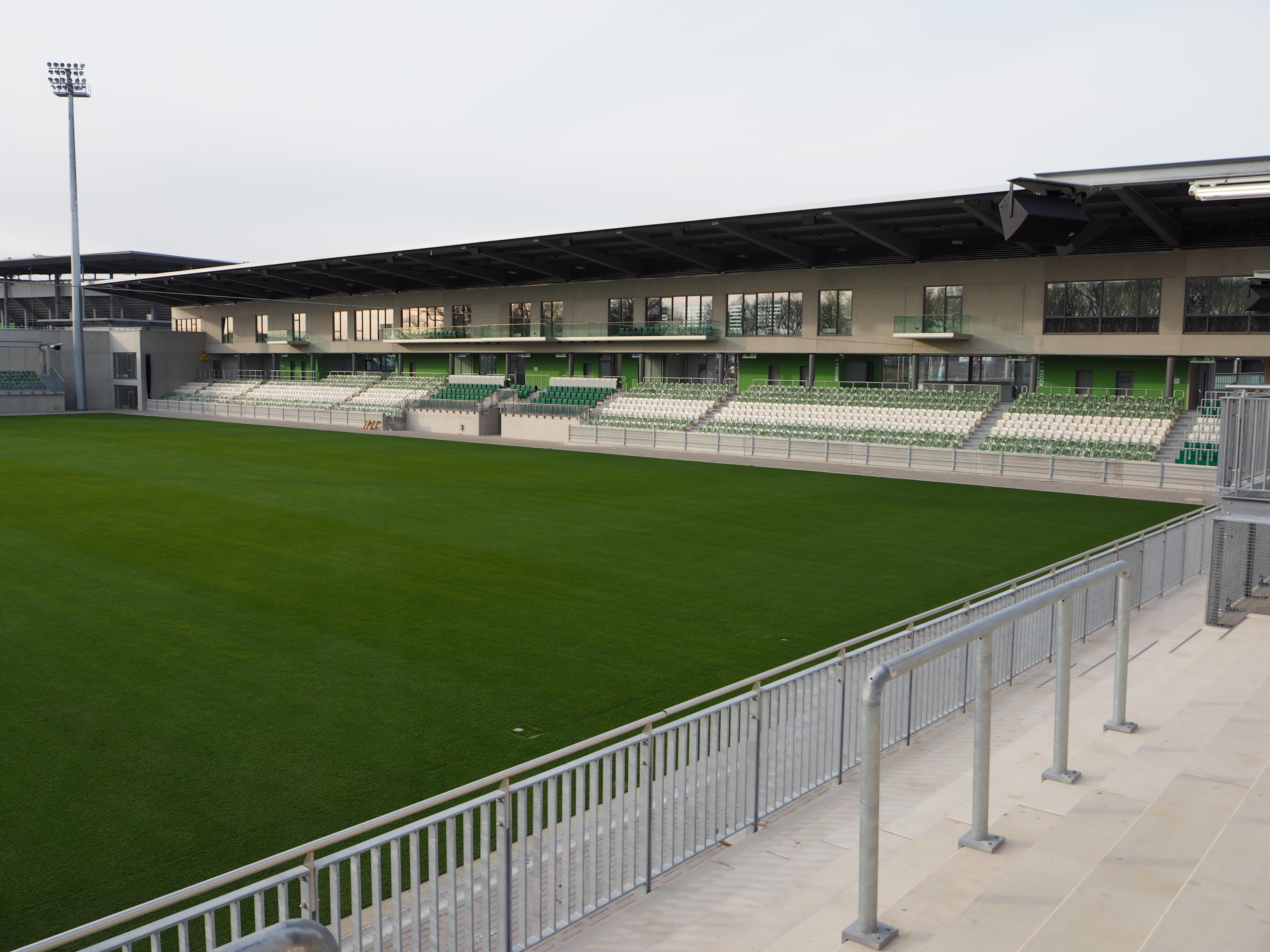 Ansicht Haupttribüne von innen